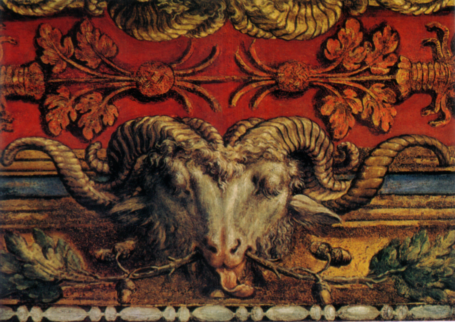 detail